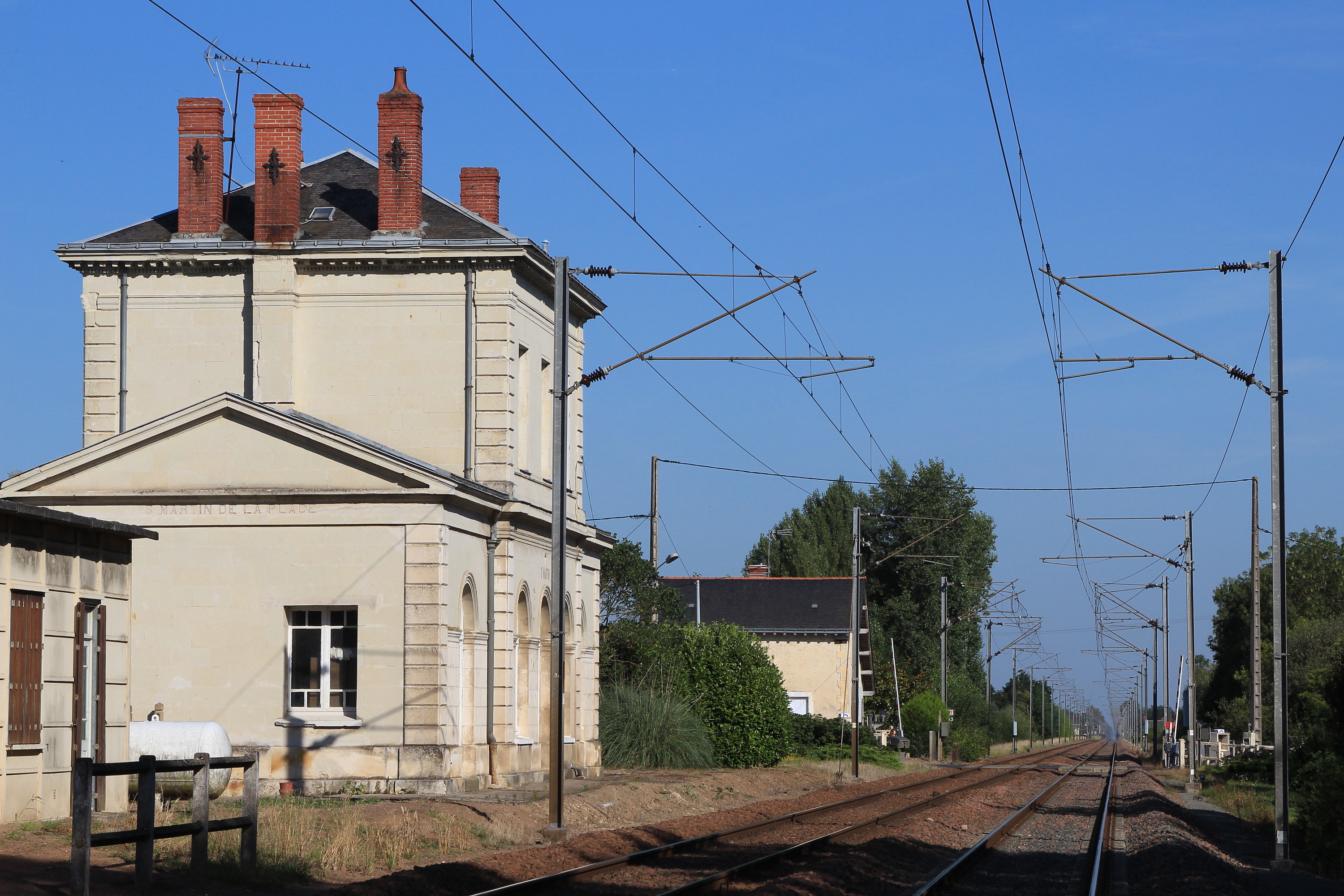 L'ancien bâtiment voyageur de la gare de Saint-MArtin-de-la-Place vu en direction de Saint-Nazaire